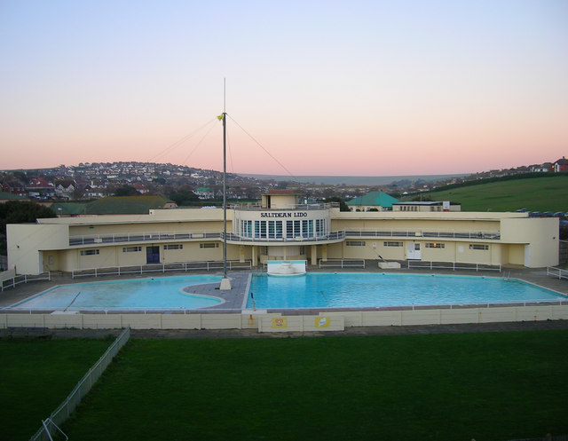 Saltdean Lido